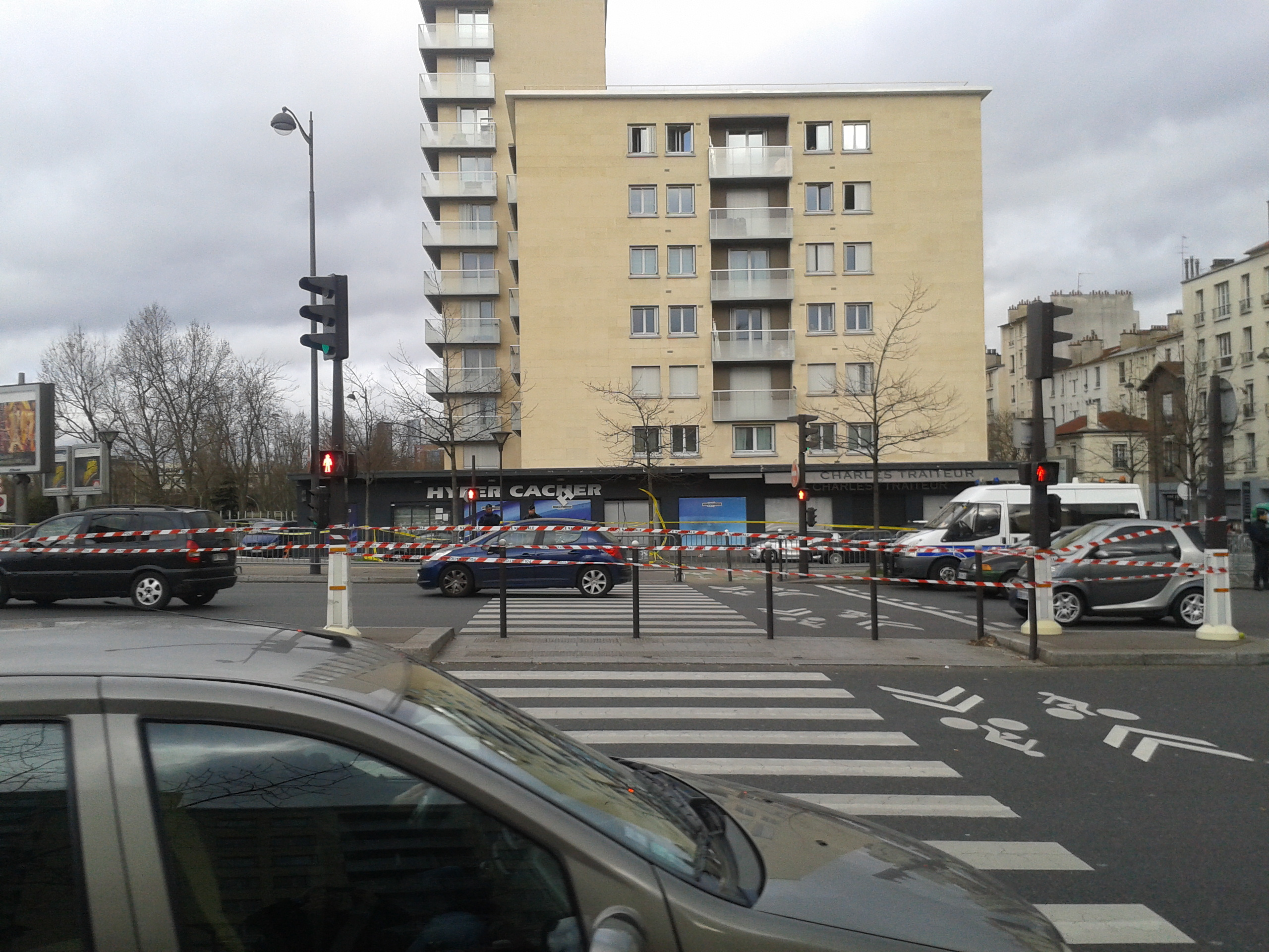 Le magasin Hyper Cacher, porte de Vincennes à Paris, au lendemain de la prise d'otages.